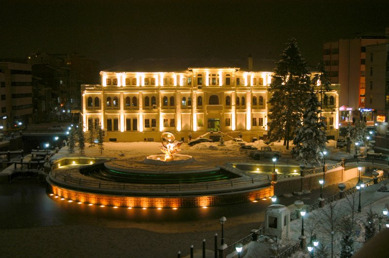 Eskişehir Tepebaşı Belediye Binası